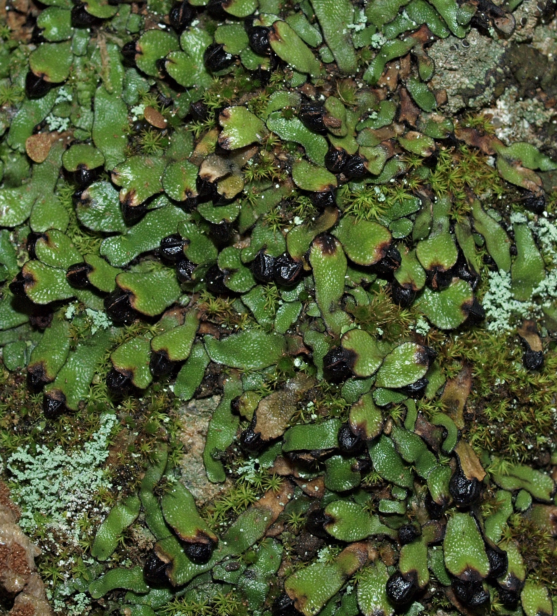 Targionia hypophylla, con involucros. Pared rezumante de bancal. Losar de la Vera (Cáceres, España).